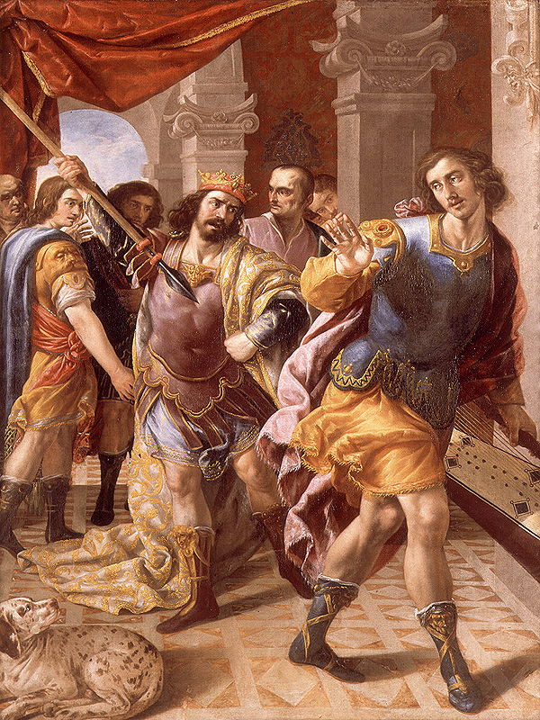 La obra representa a Saúl, el prmer rey de Israel, atentando por envidia contra la vida de David, que le sucedería en el trono.